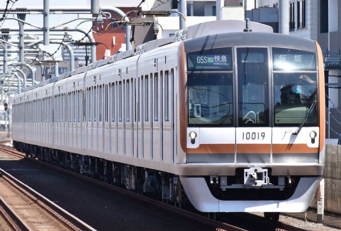 西武池袋線を走行する東京メトロ10000系10119F Fライナー快速急行飯能行き